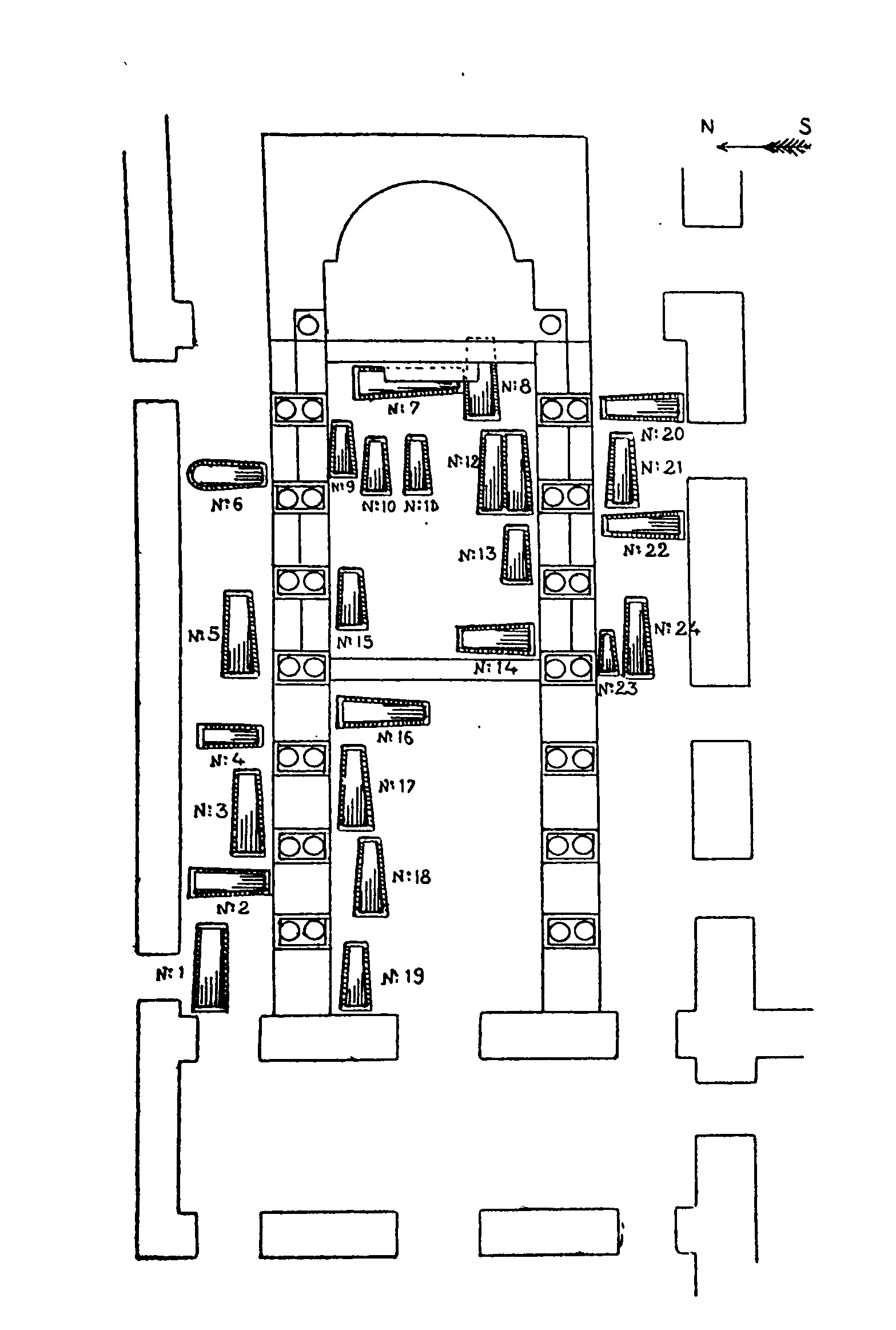 Localisation des sépultures trouvées dans le sous-sol de la basilique de Dar el Kous au Kef en Tunisie